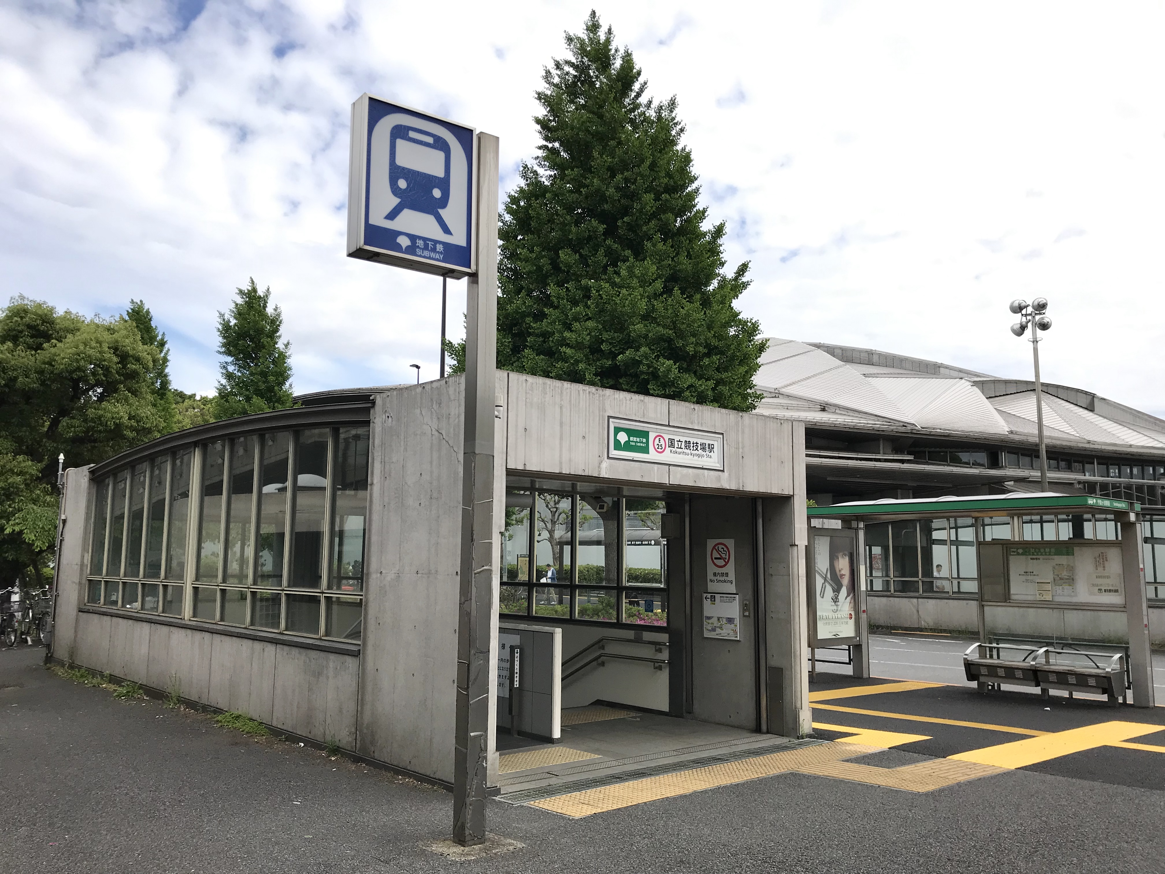 都営地下鉄大江戸線国立競技場駅A5番出入口